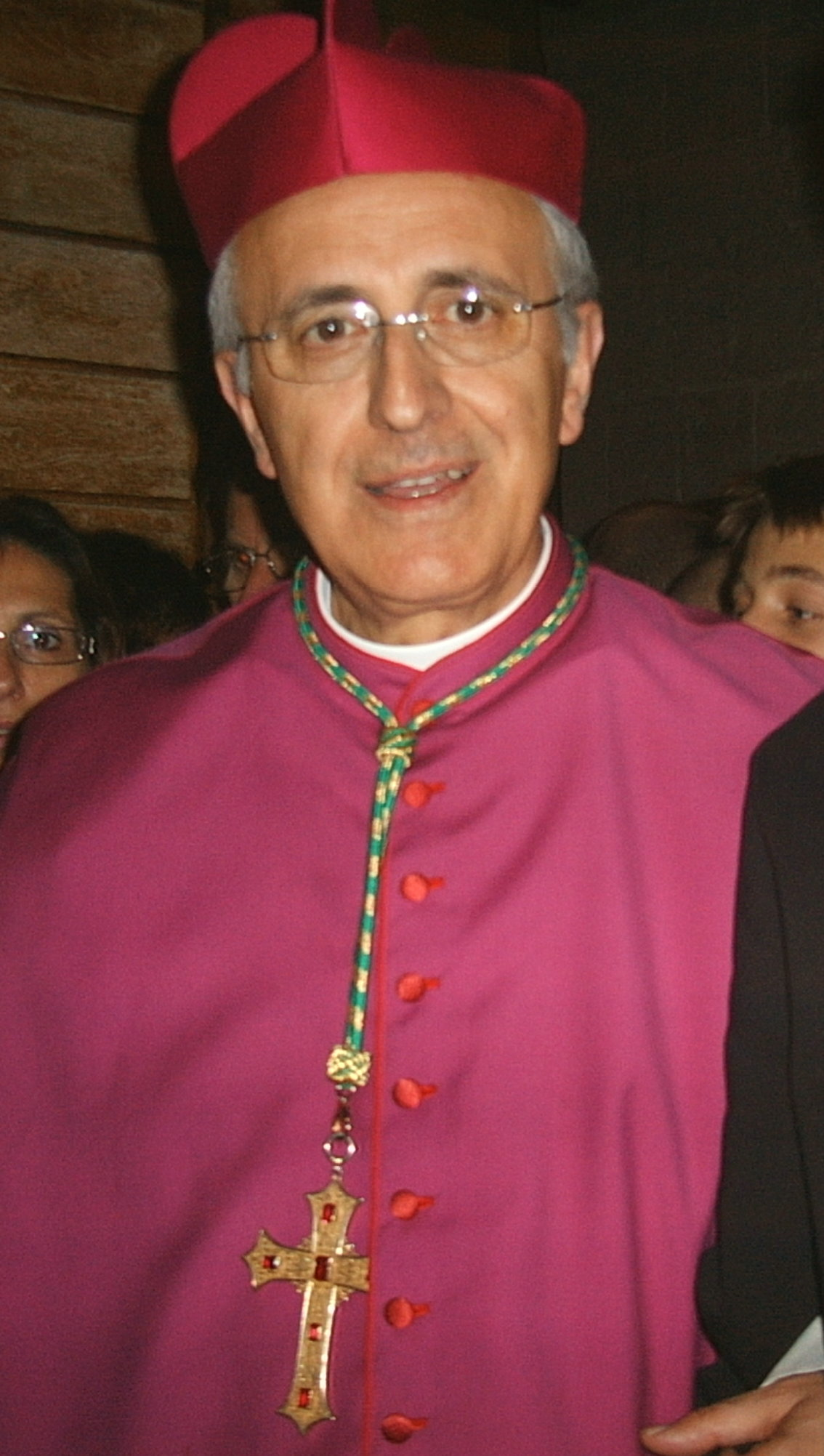 Monsignor Domenico Umberto D'Ambrosio nel 2006